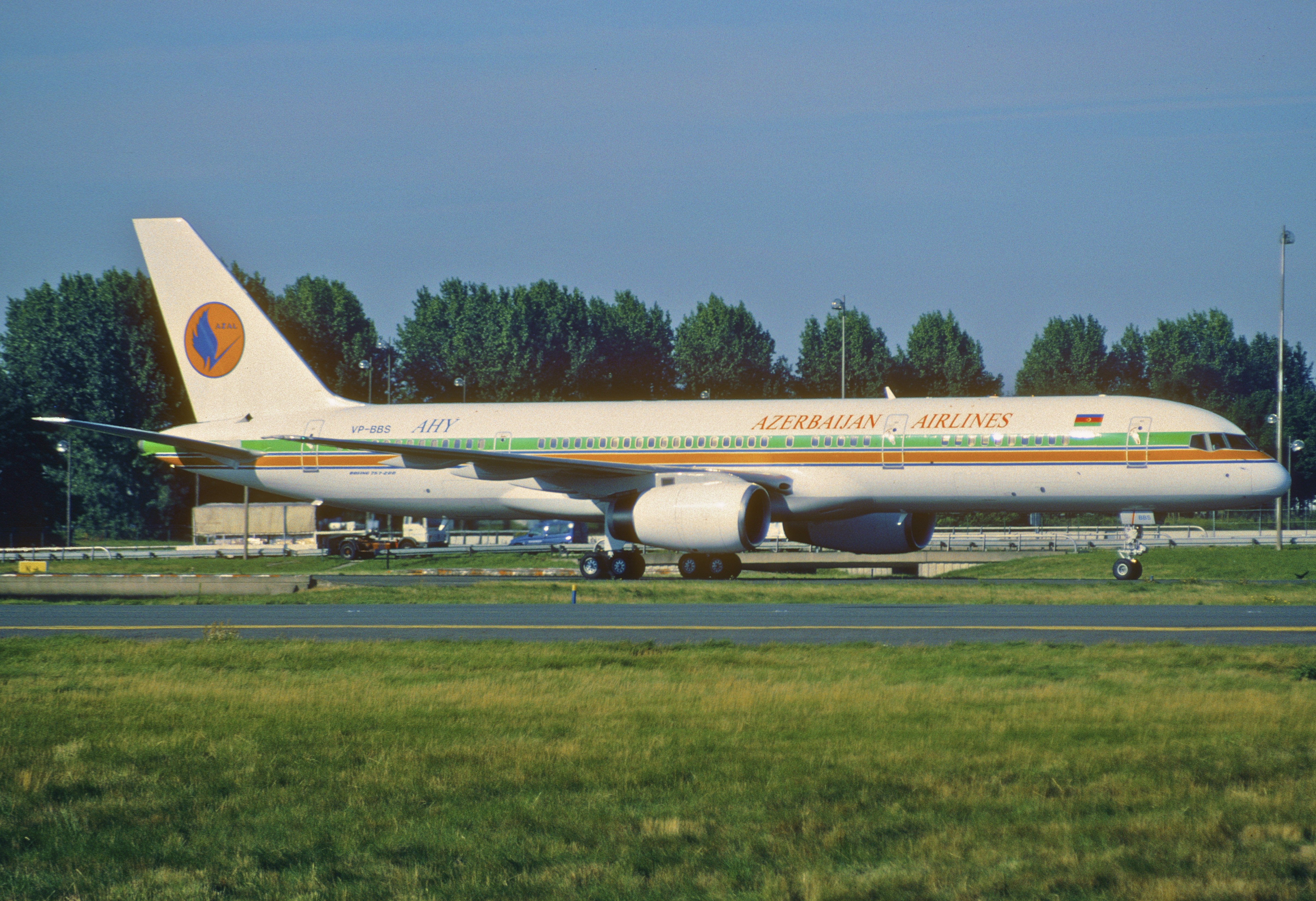 145dn - Azerbaijan Airlines Boeing 757-22L; VP-BBS@CDG;11.08.2001